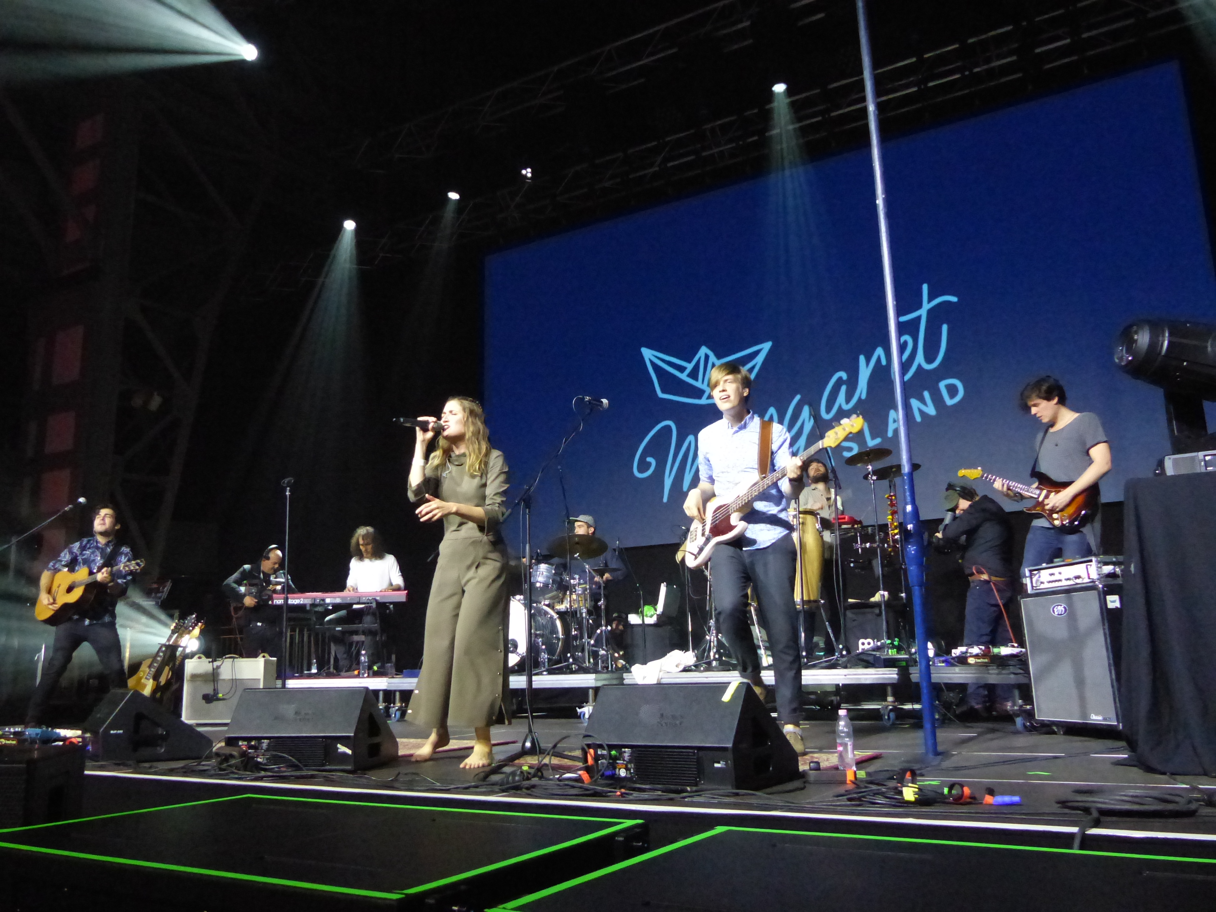 Margaret Island. A felvétel a Szabadságkoncerten készült a Millenáris B épületében, 2017. október 23-án, hétfőn. Lábas Viki ének , Törőcsik Kristóf – basszusgitár, Füstös Bálint gitár, Gerendás Dániel dob, Koltay Kurszán zongora, Verók Tamás gitár, Sárkány Bertalan dob